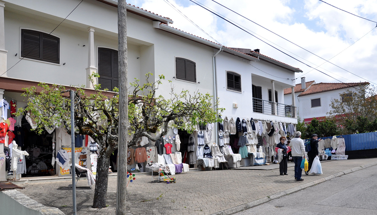 Fatima